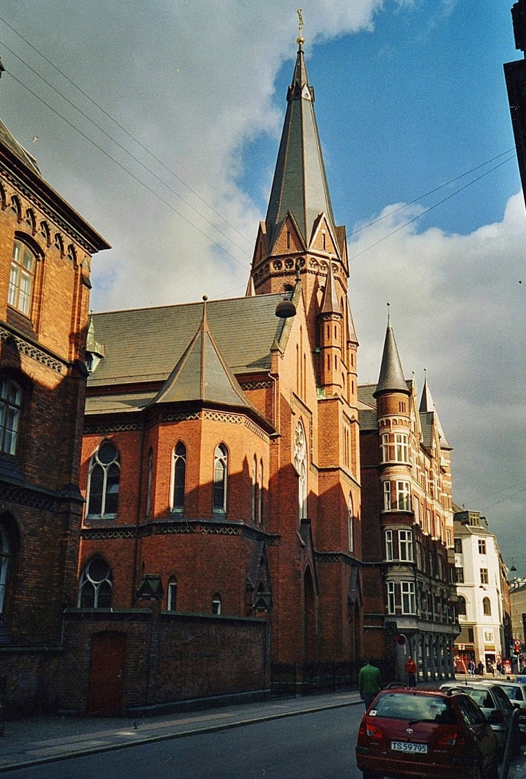 Jesu Hjerte Kirke (katolsk), Københavns Kommune